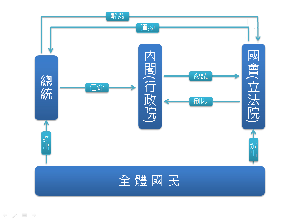 中華民國憲法增修條文把內閣制改為半總統制